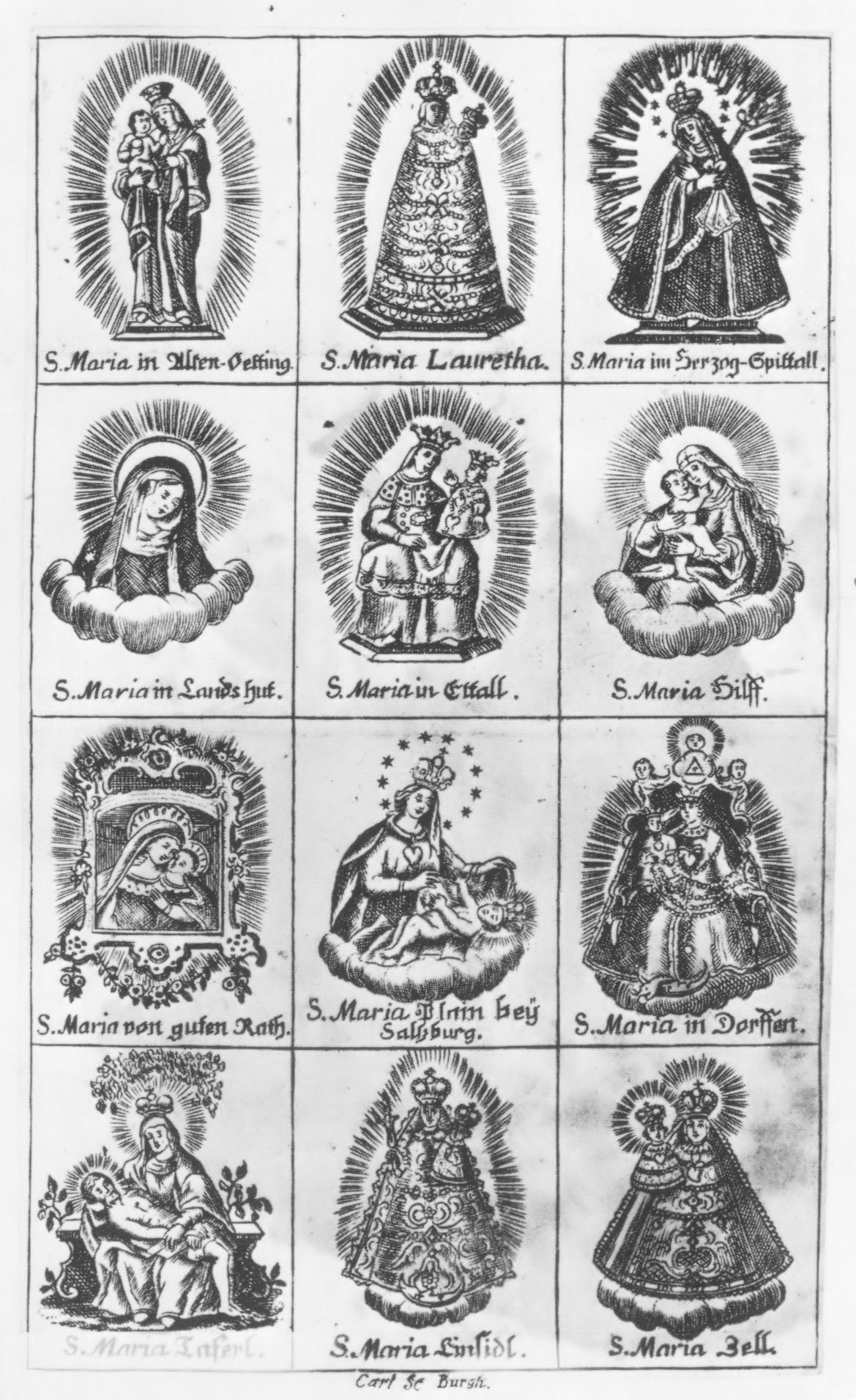 Zwölf Marianische Schluckbildchen